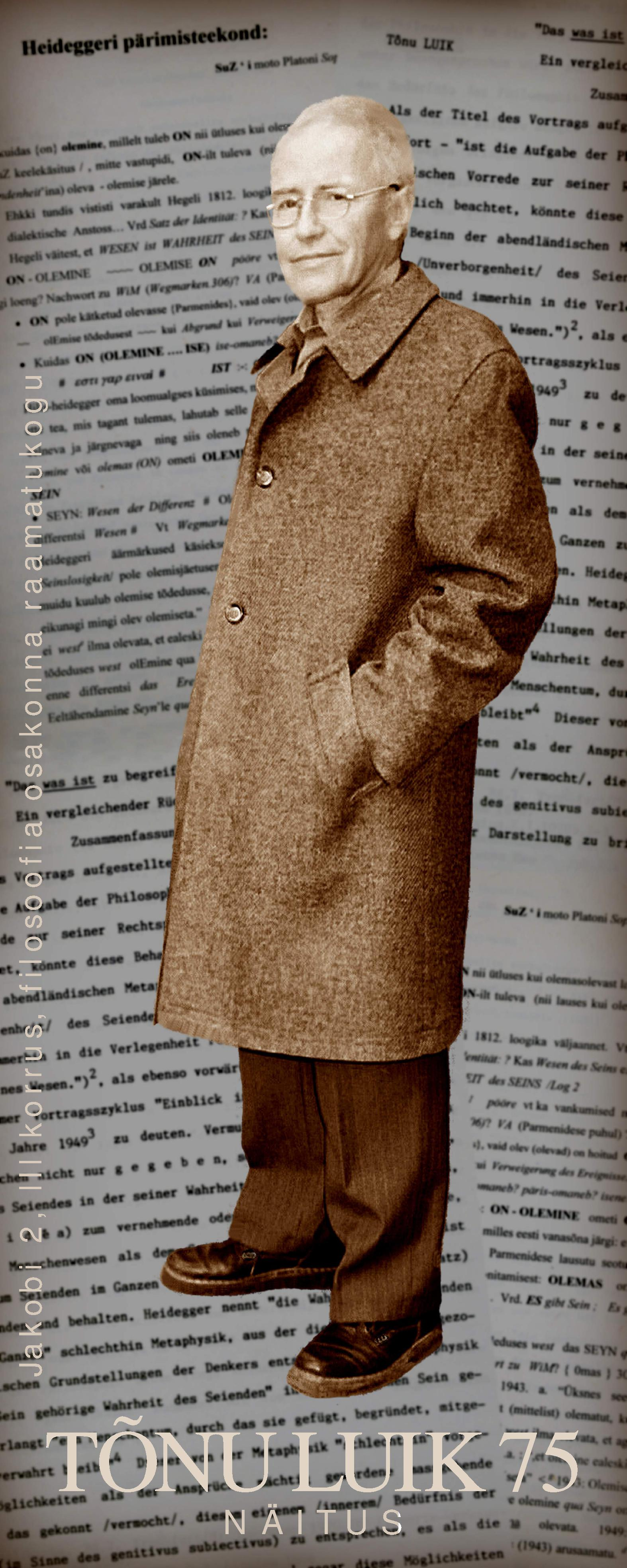 Näituse Tõnu Luik 75 plakat. Tõnu Luigele pühendatud näitus Tartu Ülikooli filosoofia osakonnas 2016. aasta maist detsembrini.